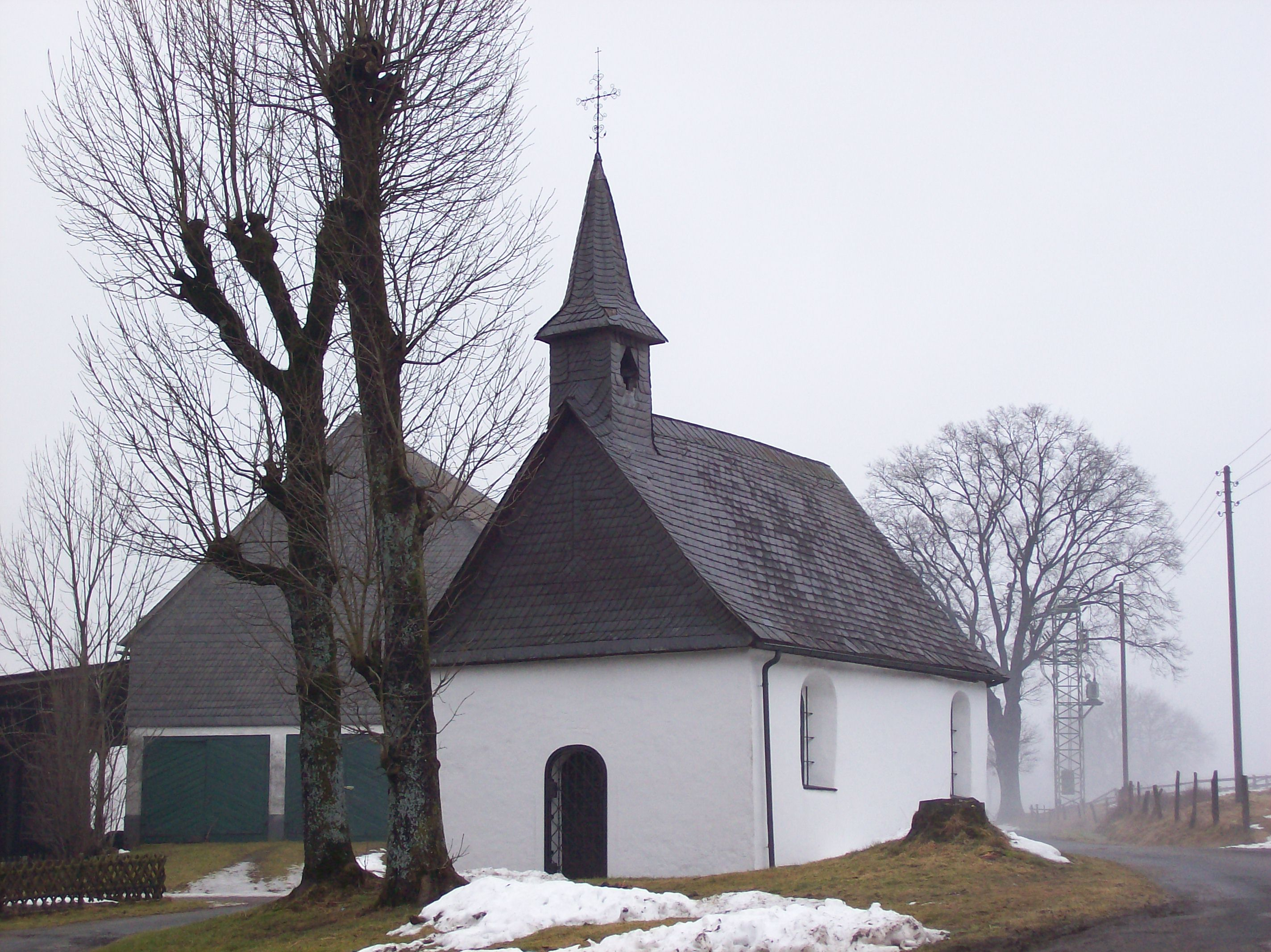 denkmalgeschützte Kapelle in Schmallenberg-Almert (Germany)